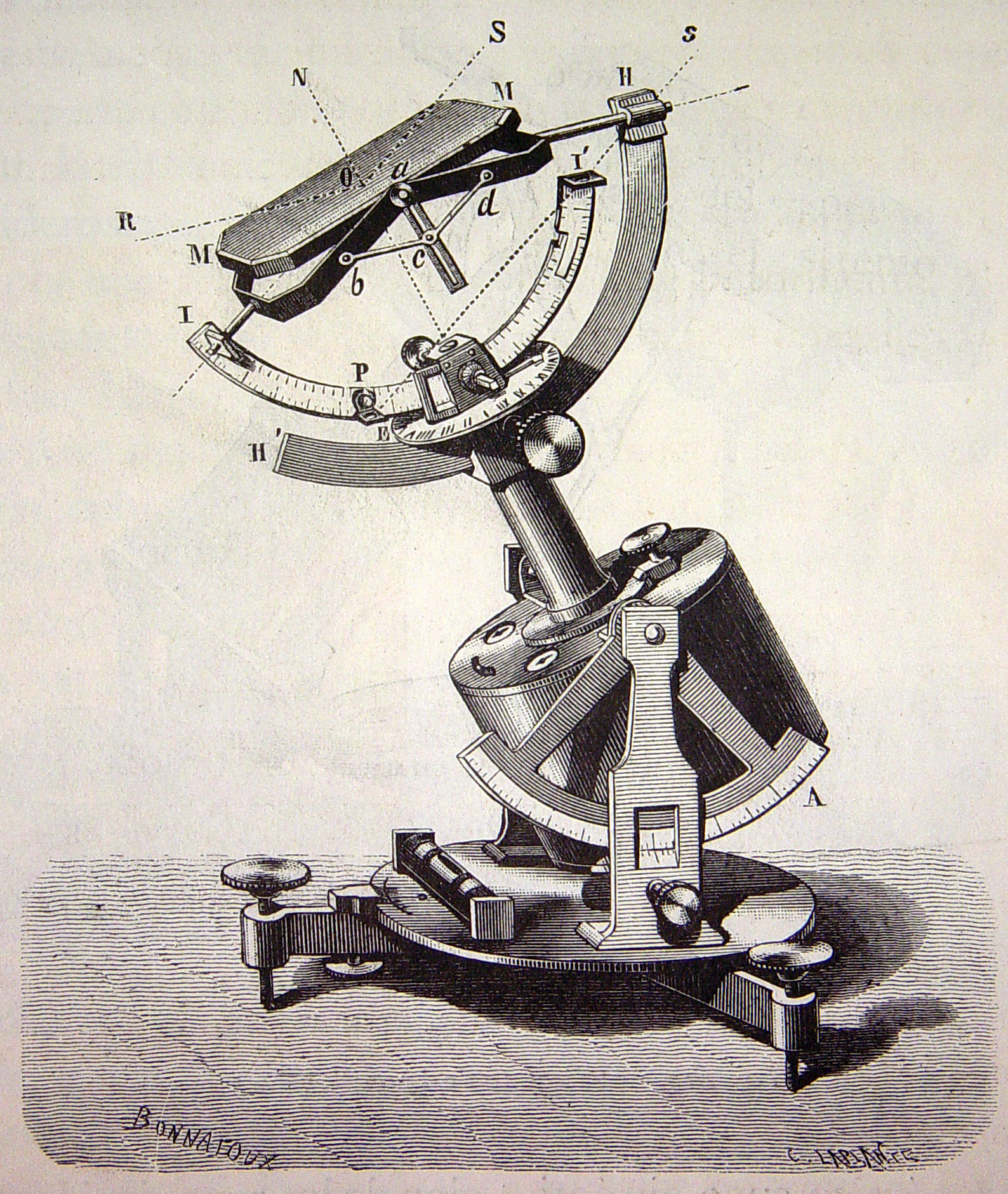 Ilustraciones pertenecientes al libro : El mundo físico : gravedad, gravitación, luz, calor, electricidad, magnetismo, etc. / A. Guillemin. - Barcelona Montaner y Simón, 1882